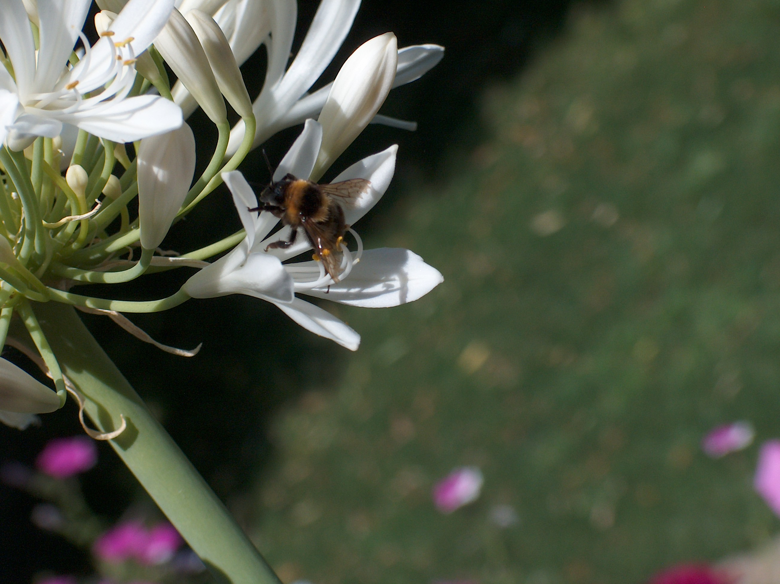 Descrição Insecto polinizando uma flor - Entomofilia Fonte Carregada pelo autor Autor João Carvalho Hp photosmart 945